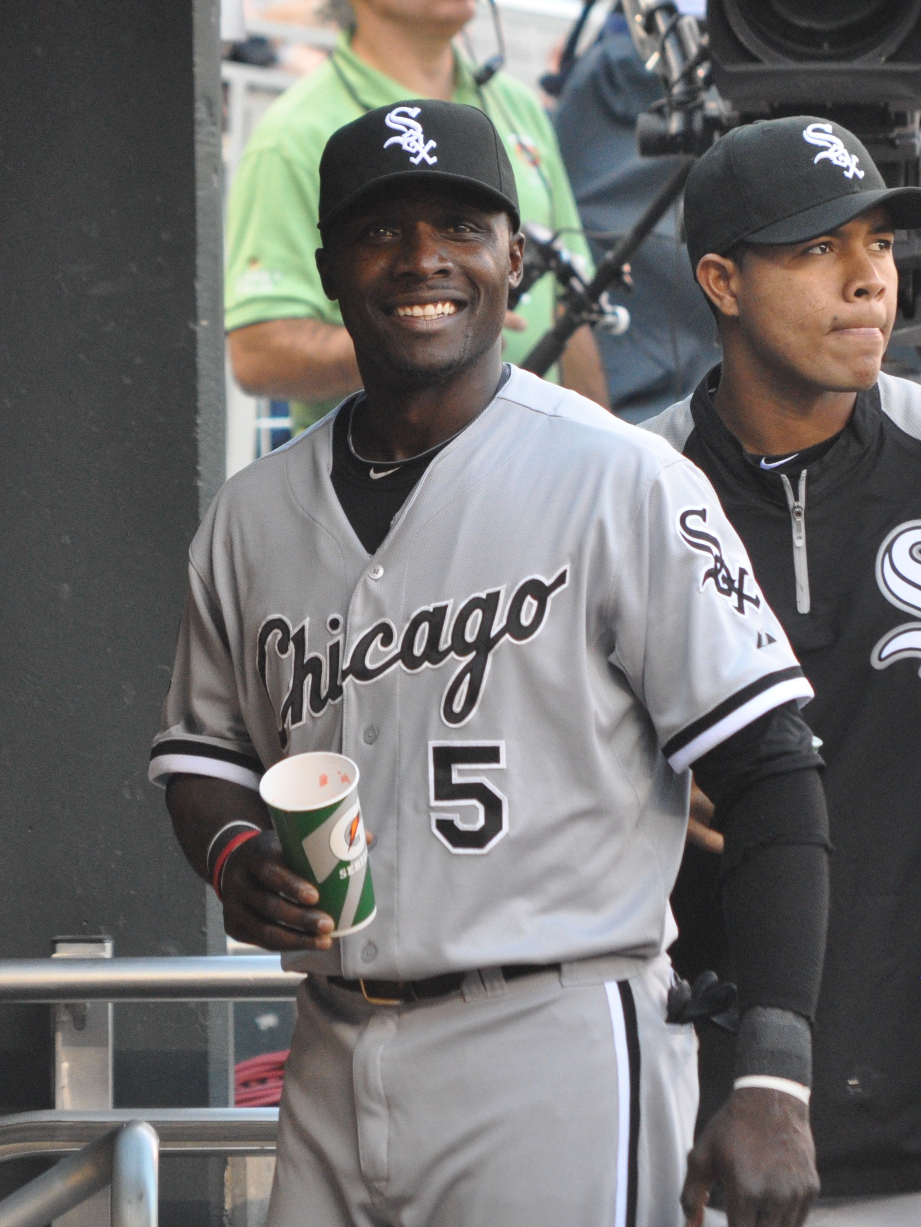 Orlando Hudson